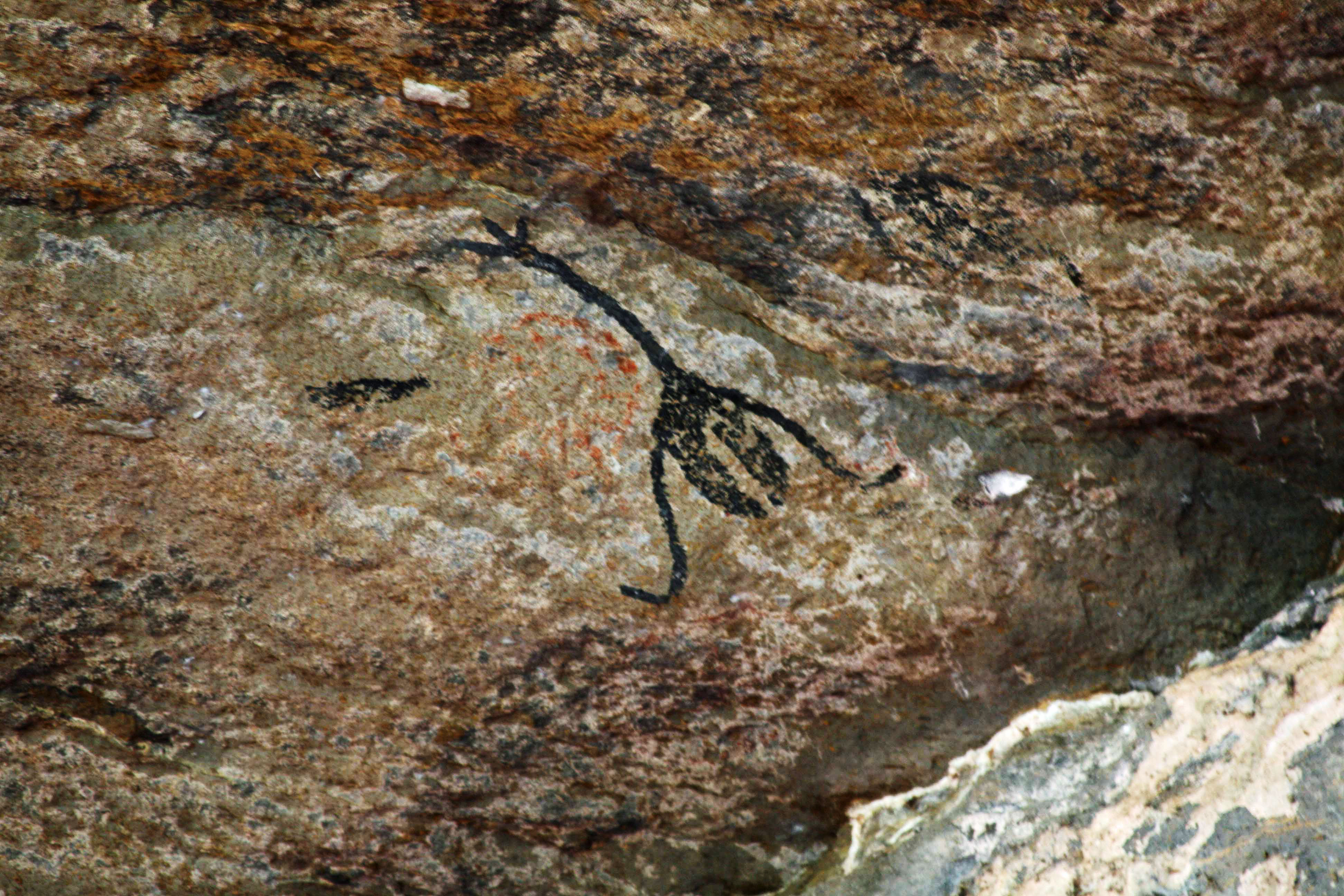 Pintura Rupestre - Gruta do Maquiné - Cordisburgo - Minas Gerais